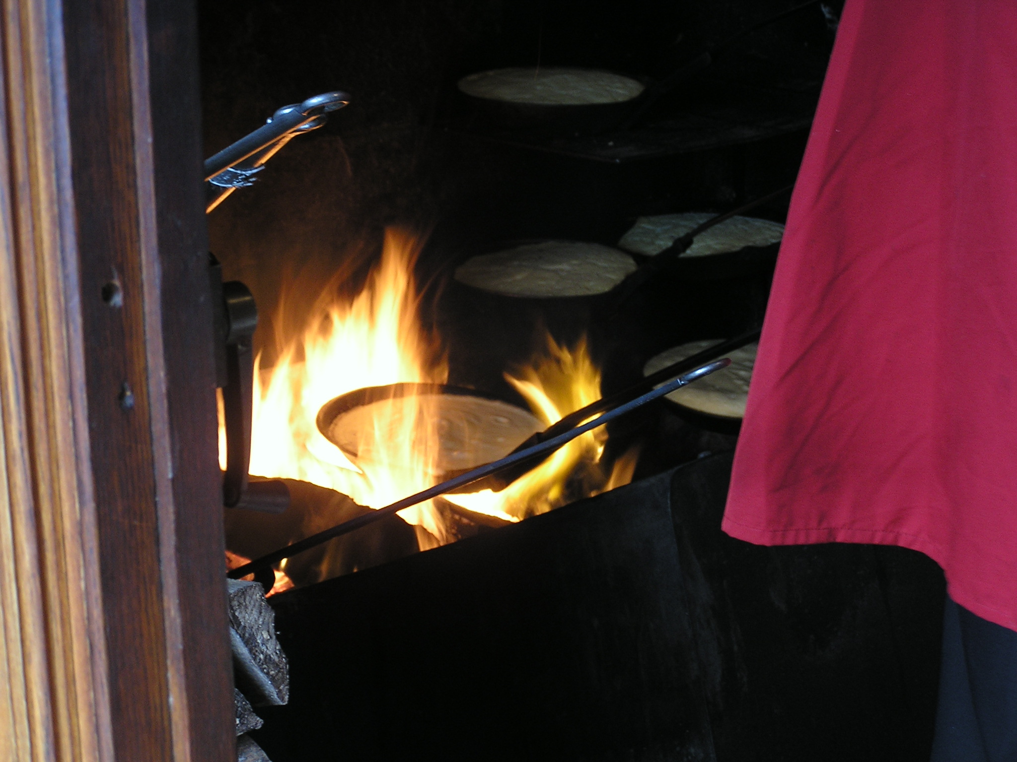 La cuisson d'omelettes chez la mère Poulard